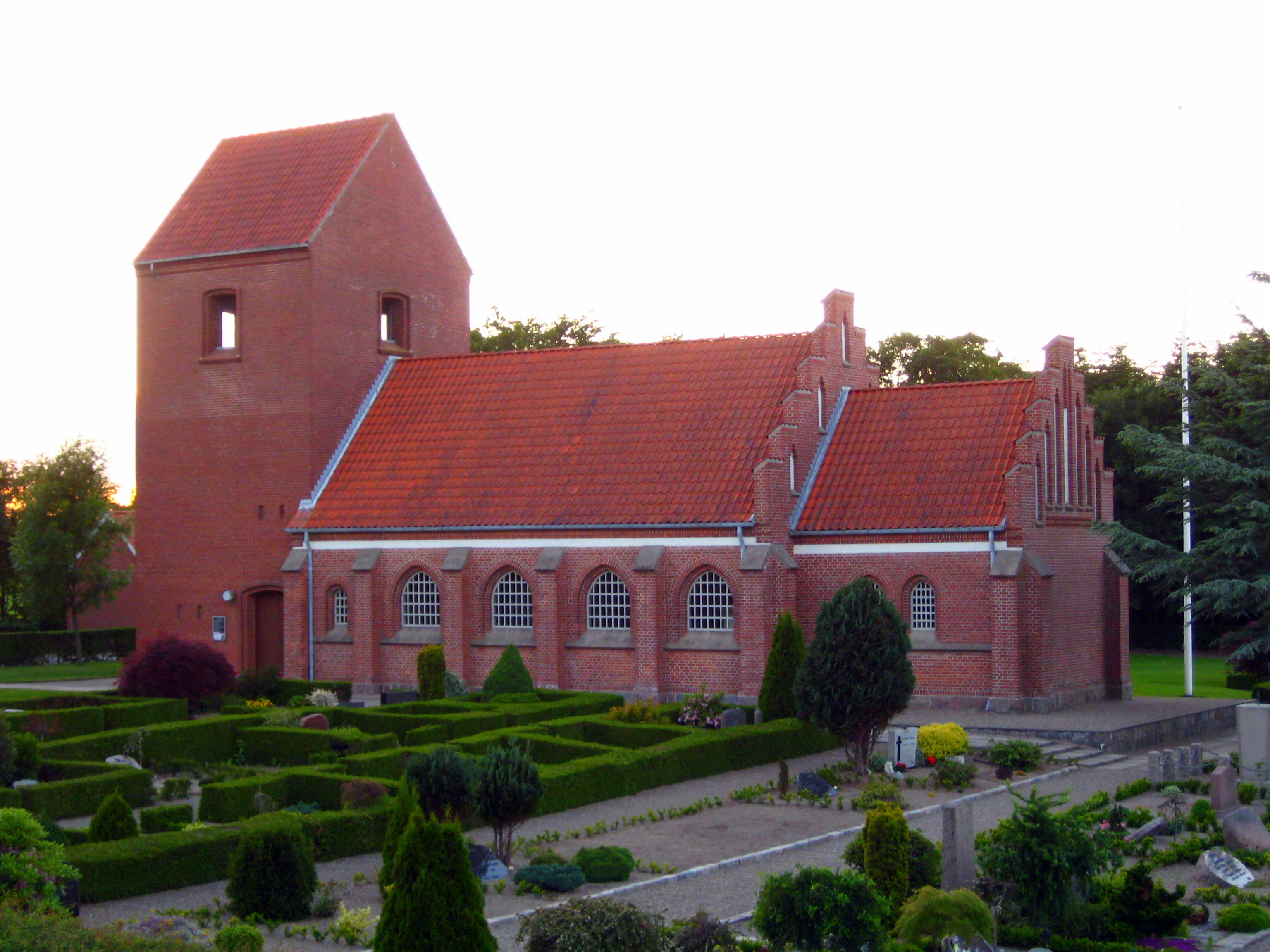 Dorf Kirke, Brønderslev Kommune